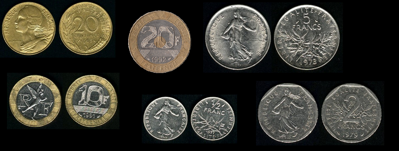 örnek madeni fransız frankları